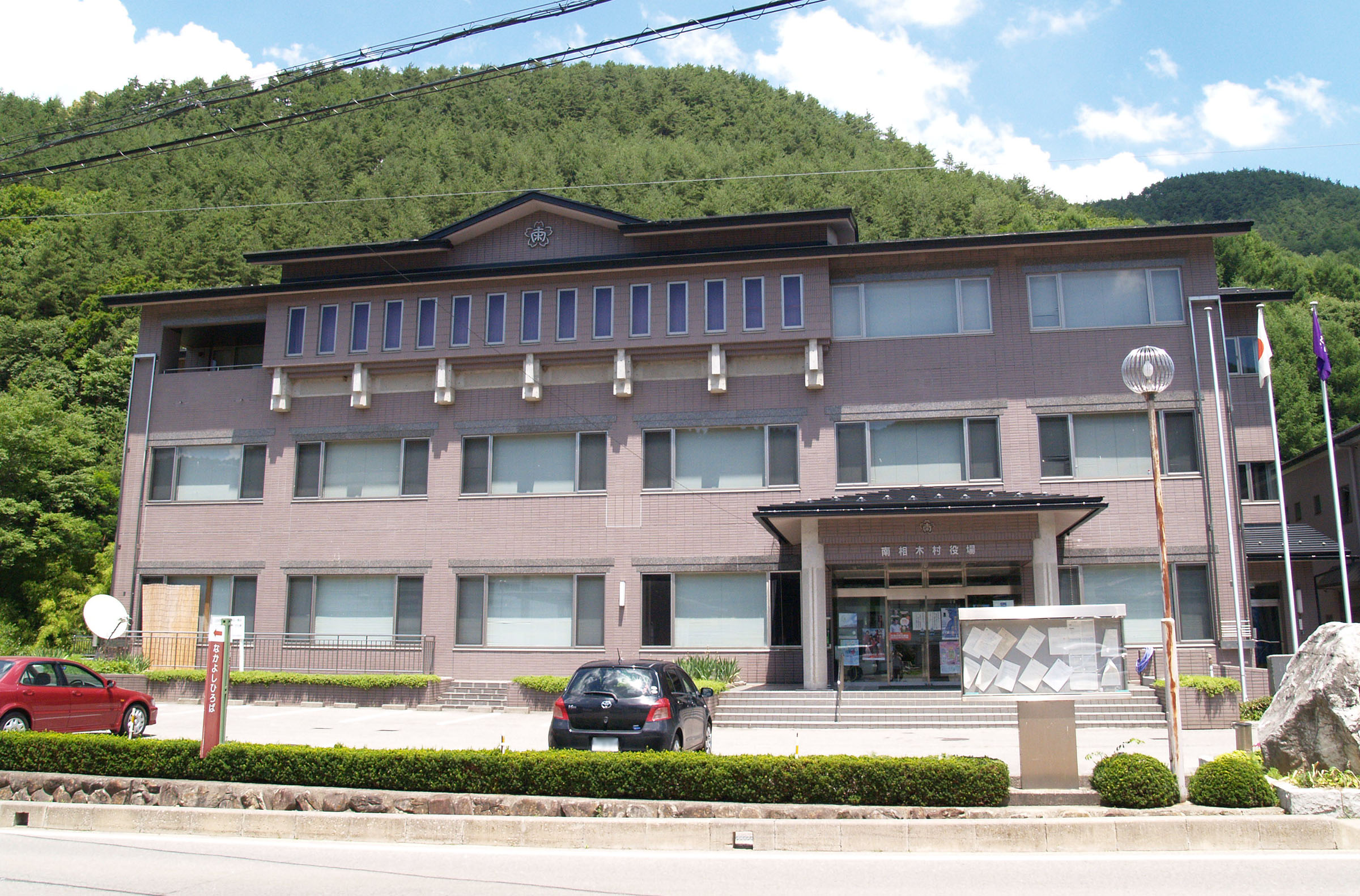 南相木村役場